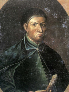 Иван Дмитриевич Бараба́ш (?—1648) — черкасский полковник, наказной гетман малорусских казаков